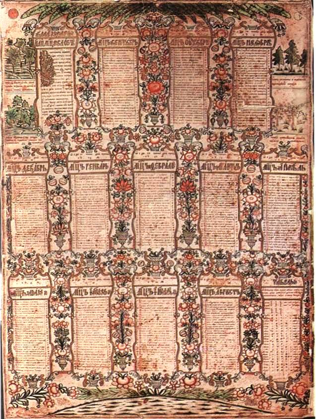 Календарь месяцеслов. 1830-е. Неизвестный художник. Чернила, темпера, 72x54. Приобретено у А. Л. Бахрушина в 1921 г. На картинке имеется таблица с исчислением Пасхалии с 1830 по 1851 г. Из собрания Государственного Исторического музея.